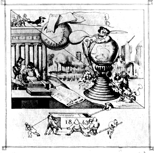 Cartoon: Banning of Rheinische Zeitung